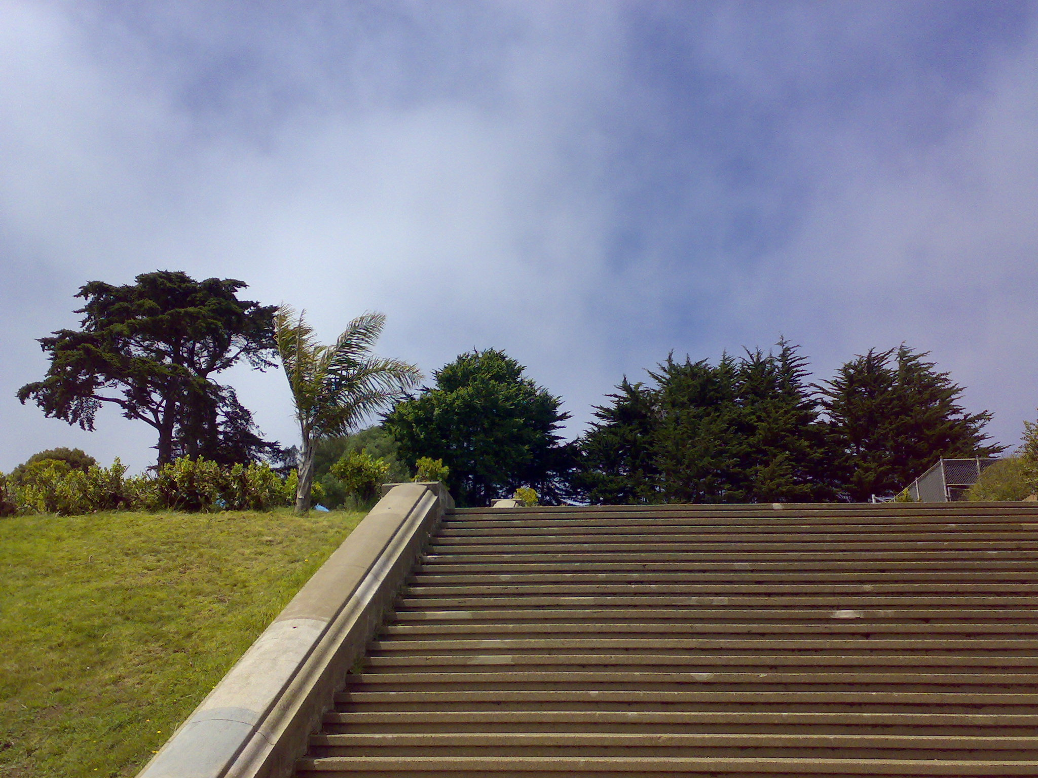 Alta Plaza park in San Francisco